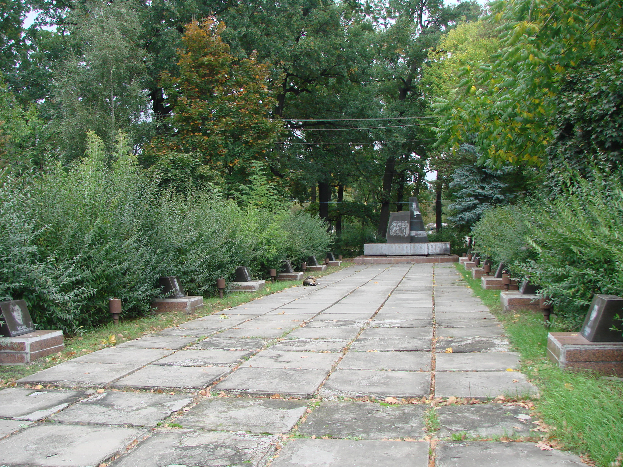 Меморіальний комплекс захисникам Вітчизни, смт.Борова, вул.Франка